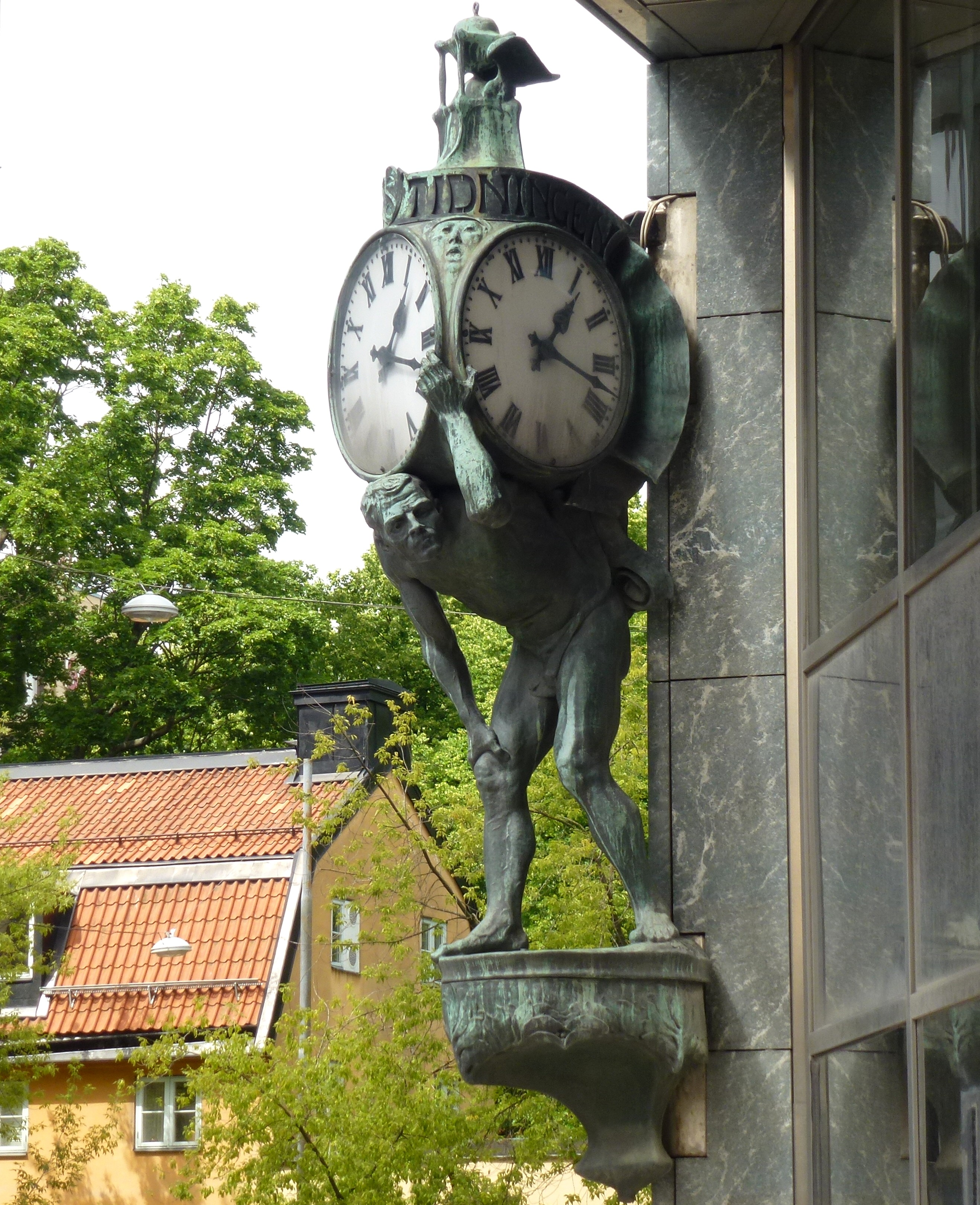 Linderoths klock-skulptur vid Vattugatan / Klara Södra Kyrkogata